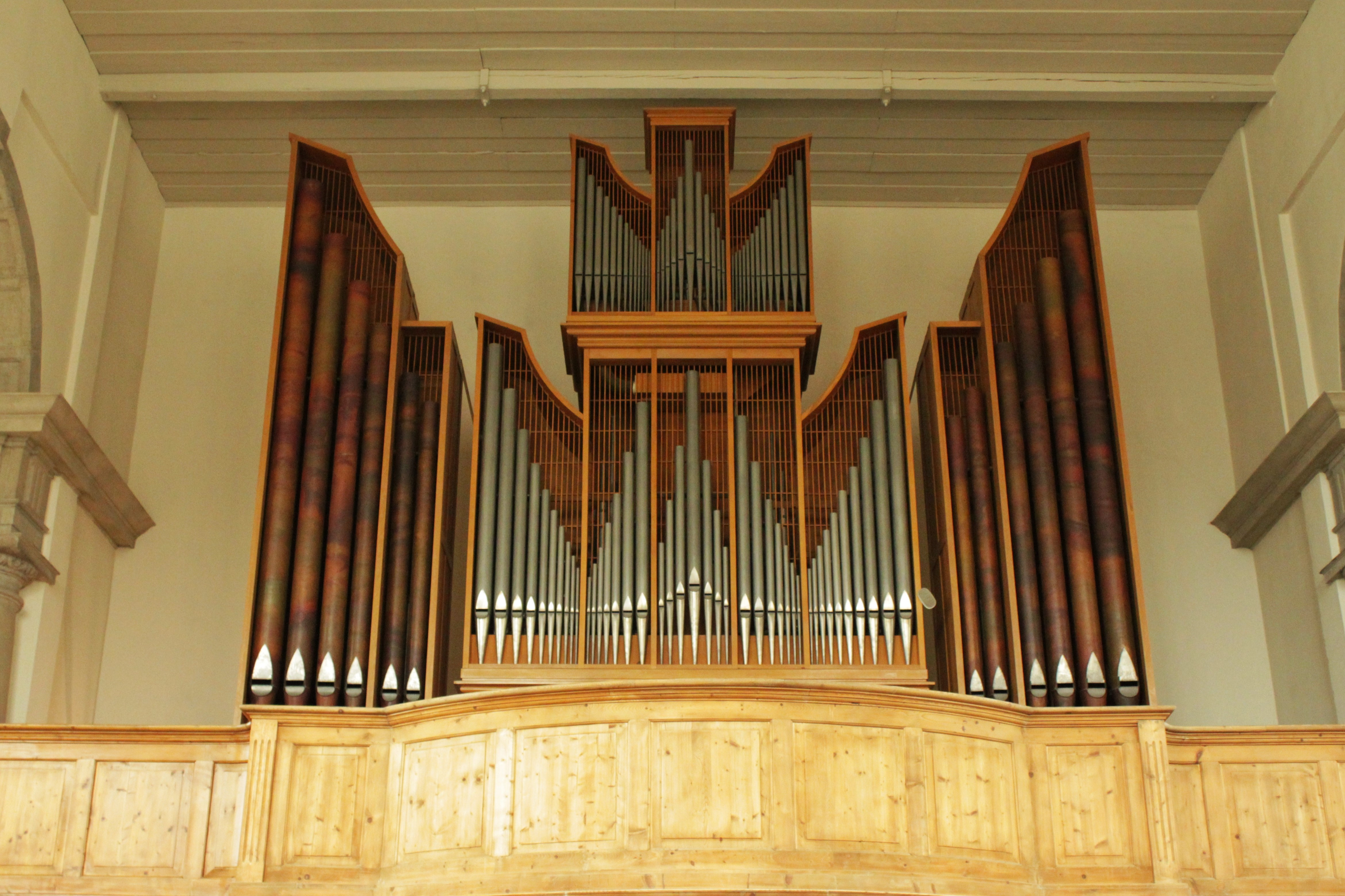 Orgel der Neuen Kirche in Emden, Ostfriesland, Niedersachsen, Deutschland